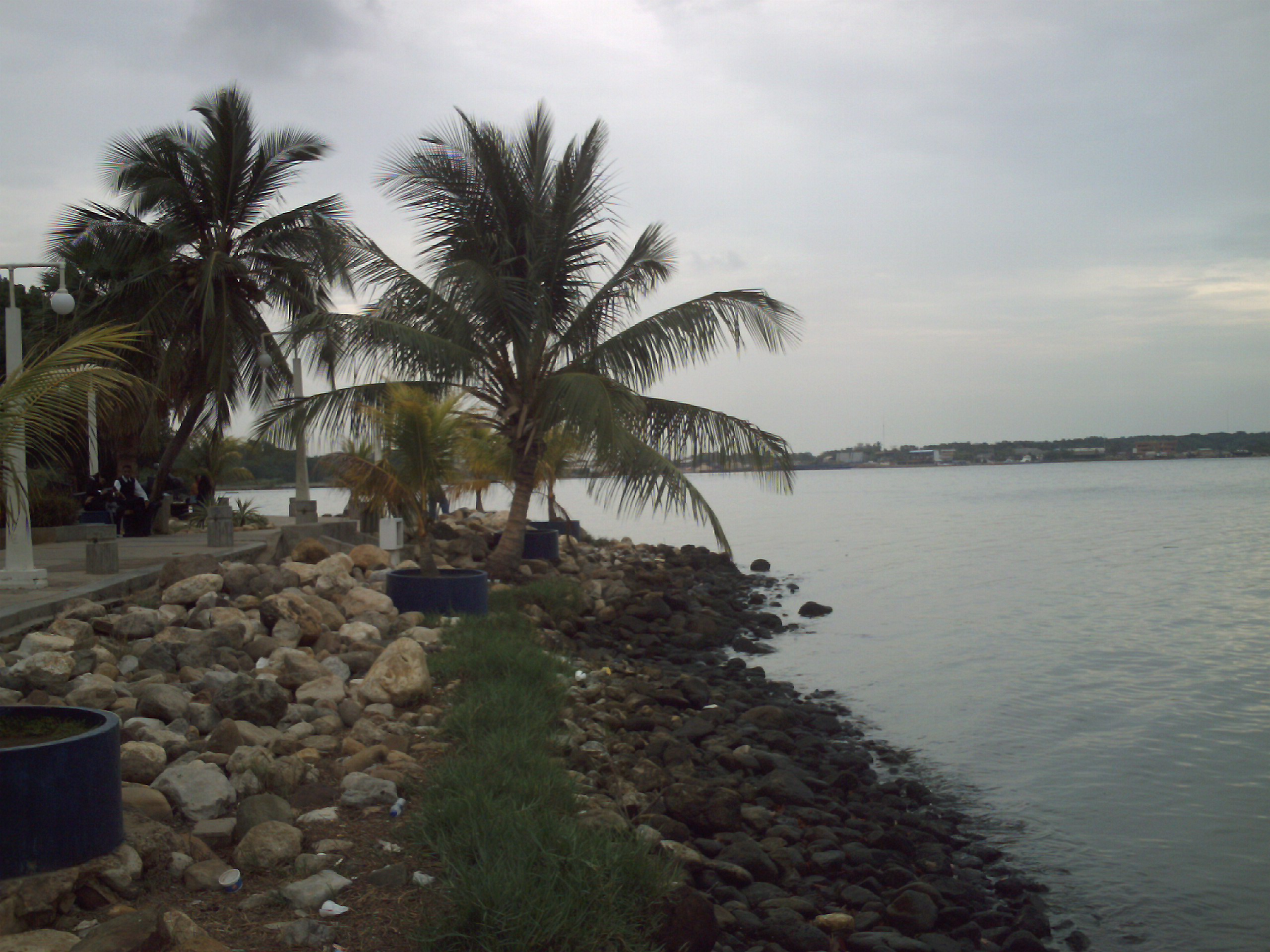 Lago de Maracaibo